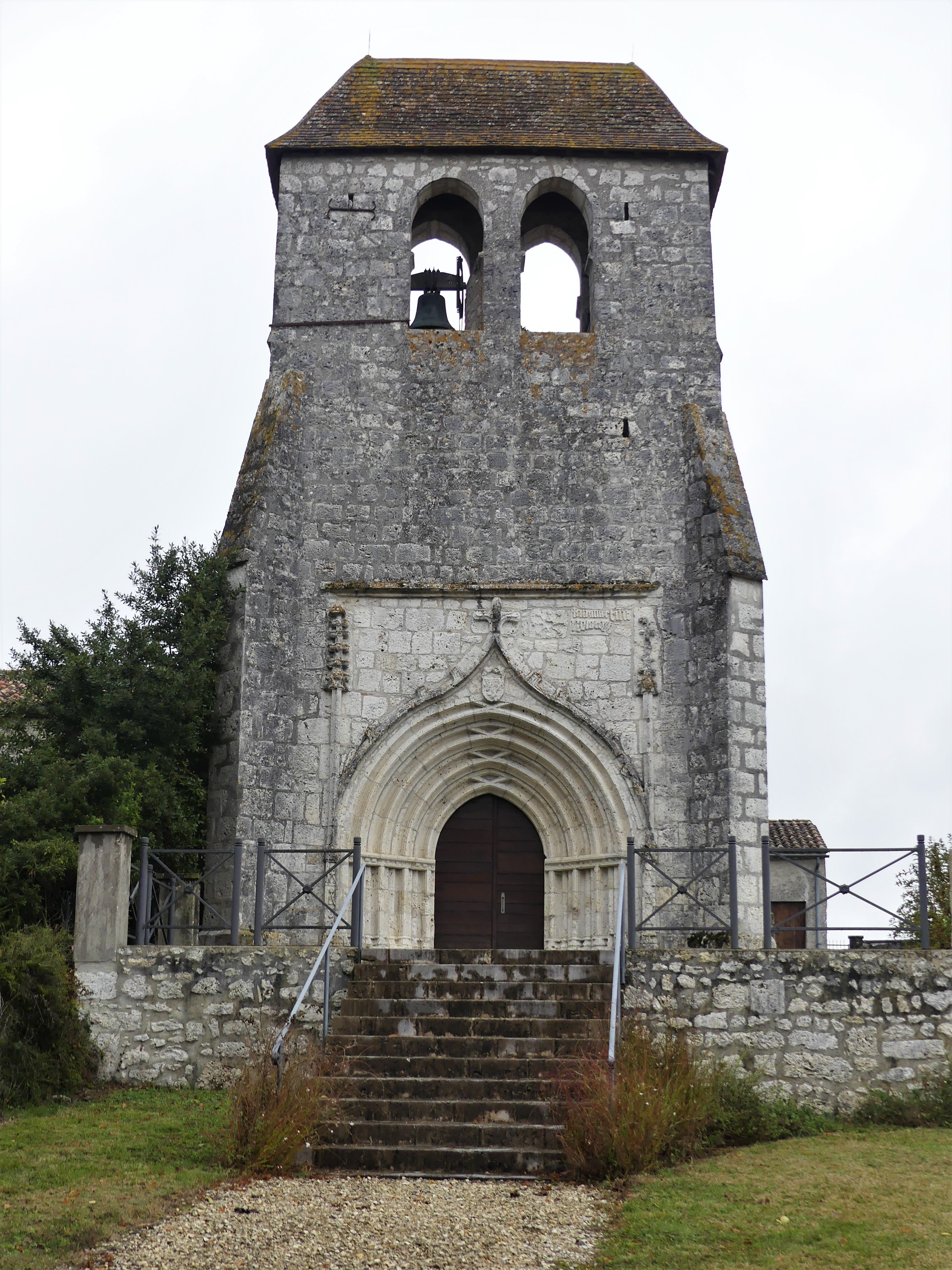 La façade occidentale de l'église, Sainte-Innocence, Dordogne, France.